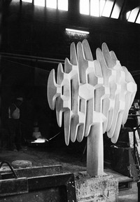 Ipotesi Vegetale - marble - 1969